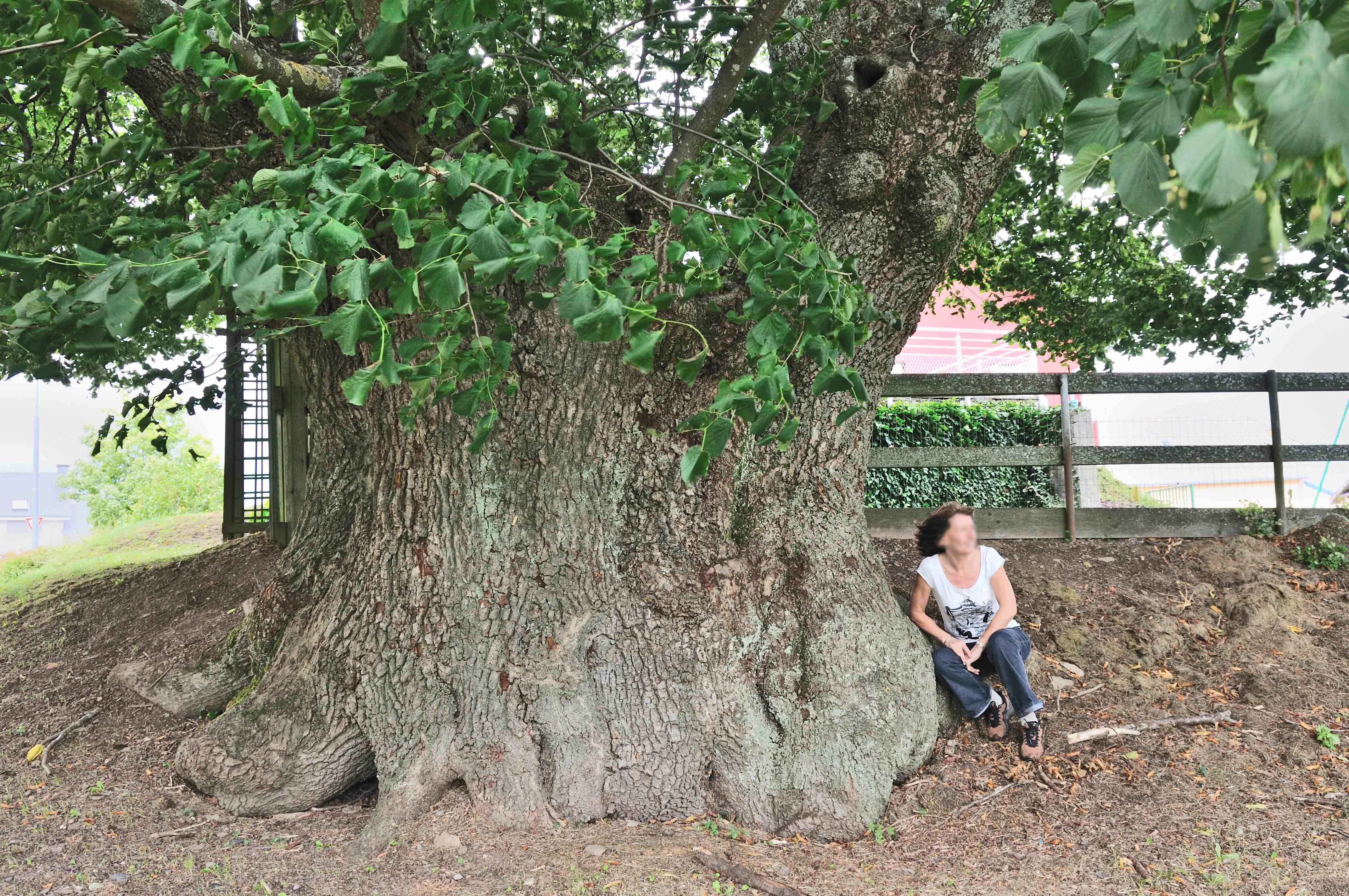 Lann zu Pëtscht, hire Stamm.